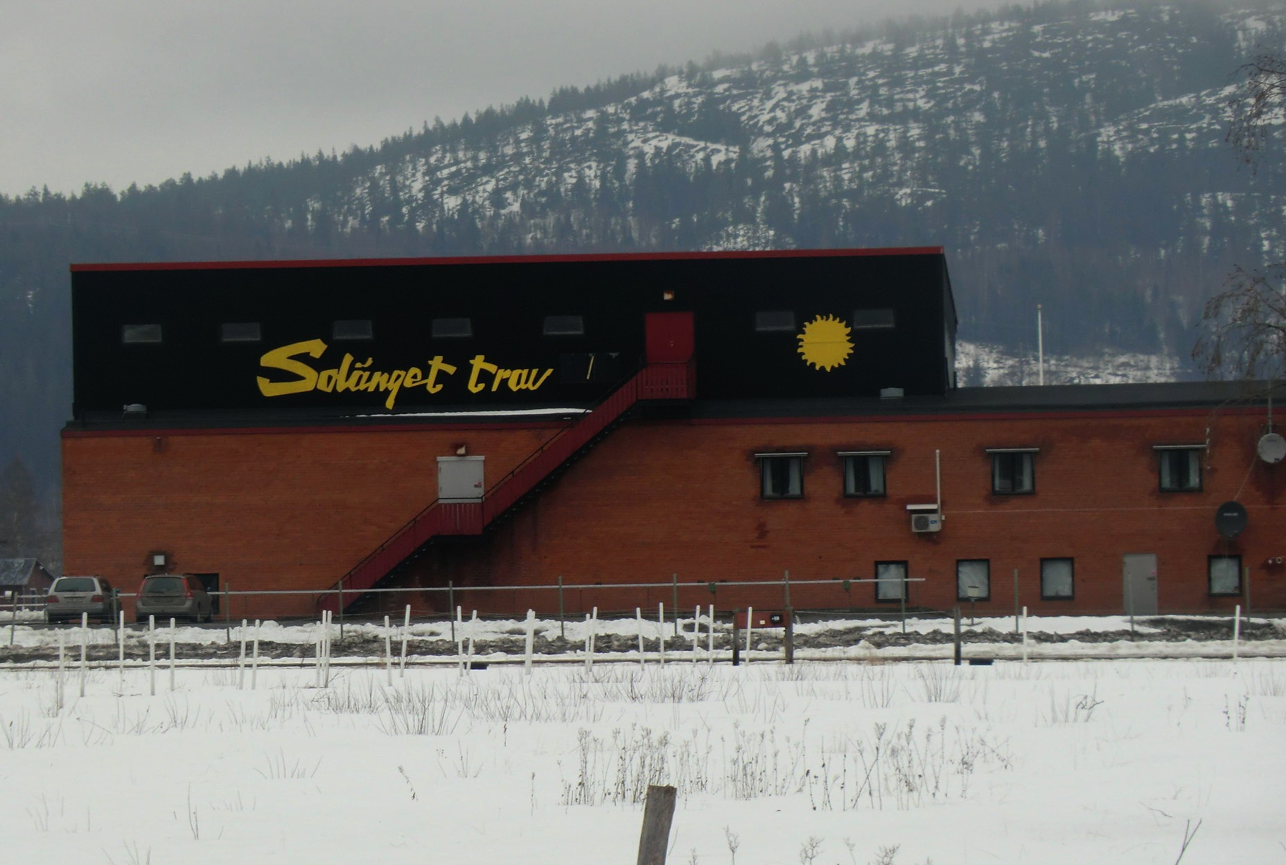 Solängets travbana i Svedjeholmen, Örnsköldsvik.